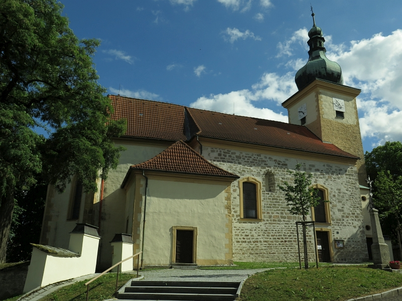 Kostel Nanebevzetí Panny Marie, Myslív.